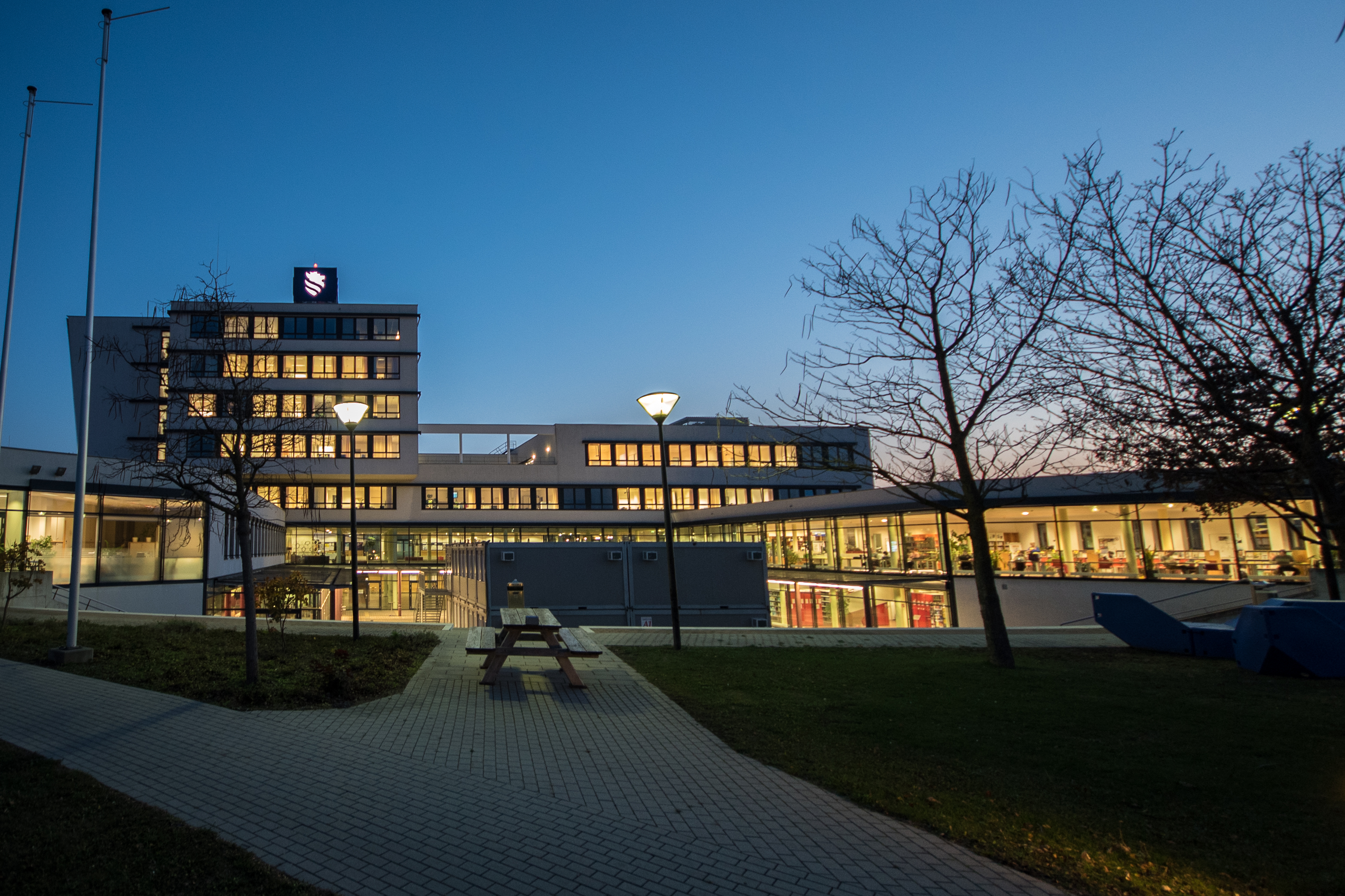 Innenbereich 2018